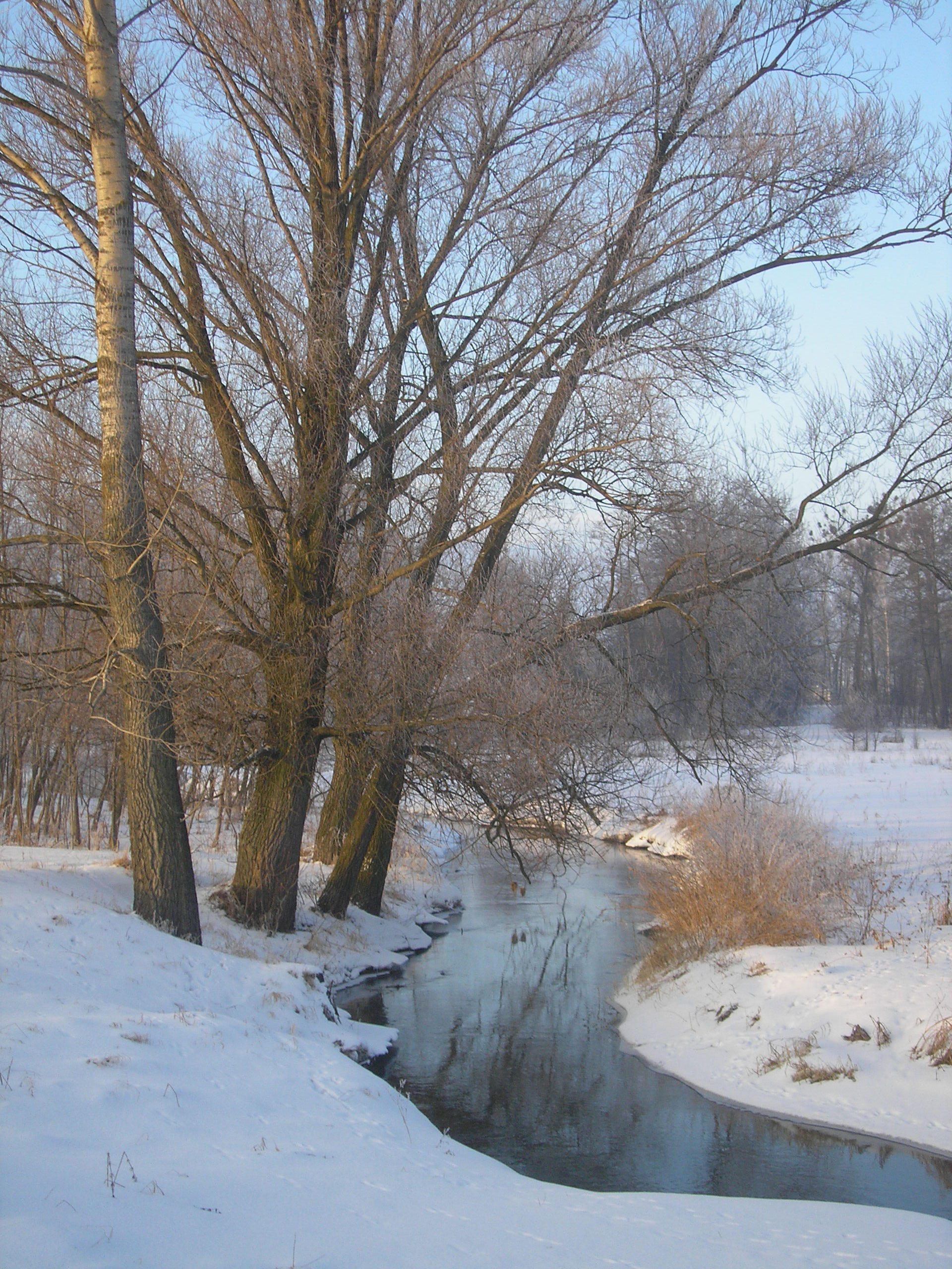 Kurówka River in Chrząchów, Poland